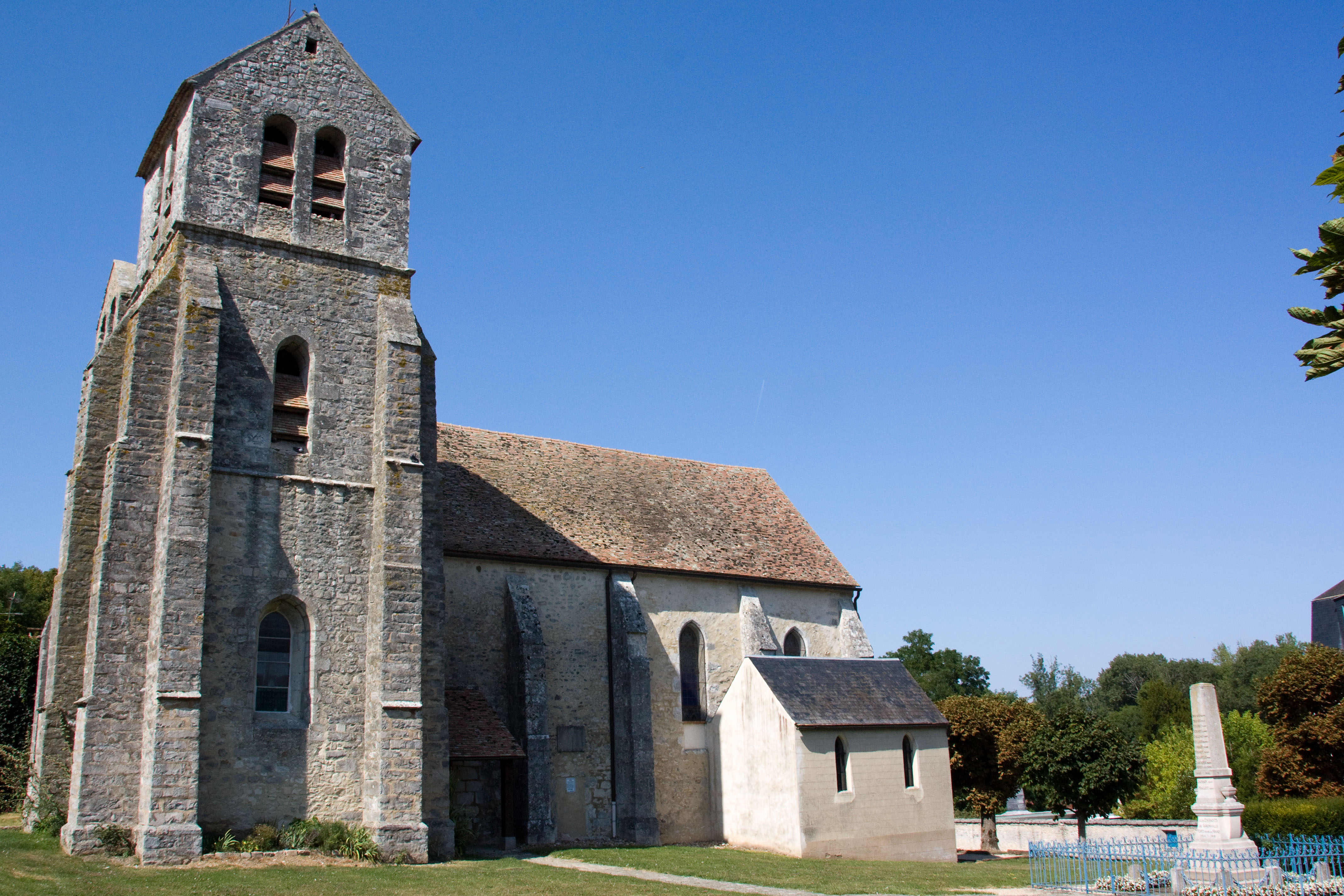 Eglise de Gironville-sur-Essonne, Gironville-sur-Essonne, Essonne, France